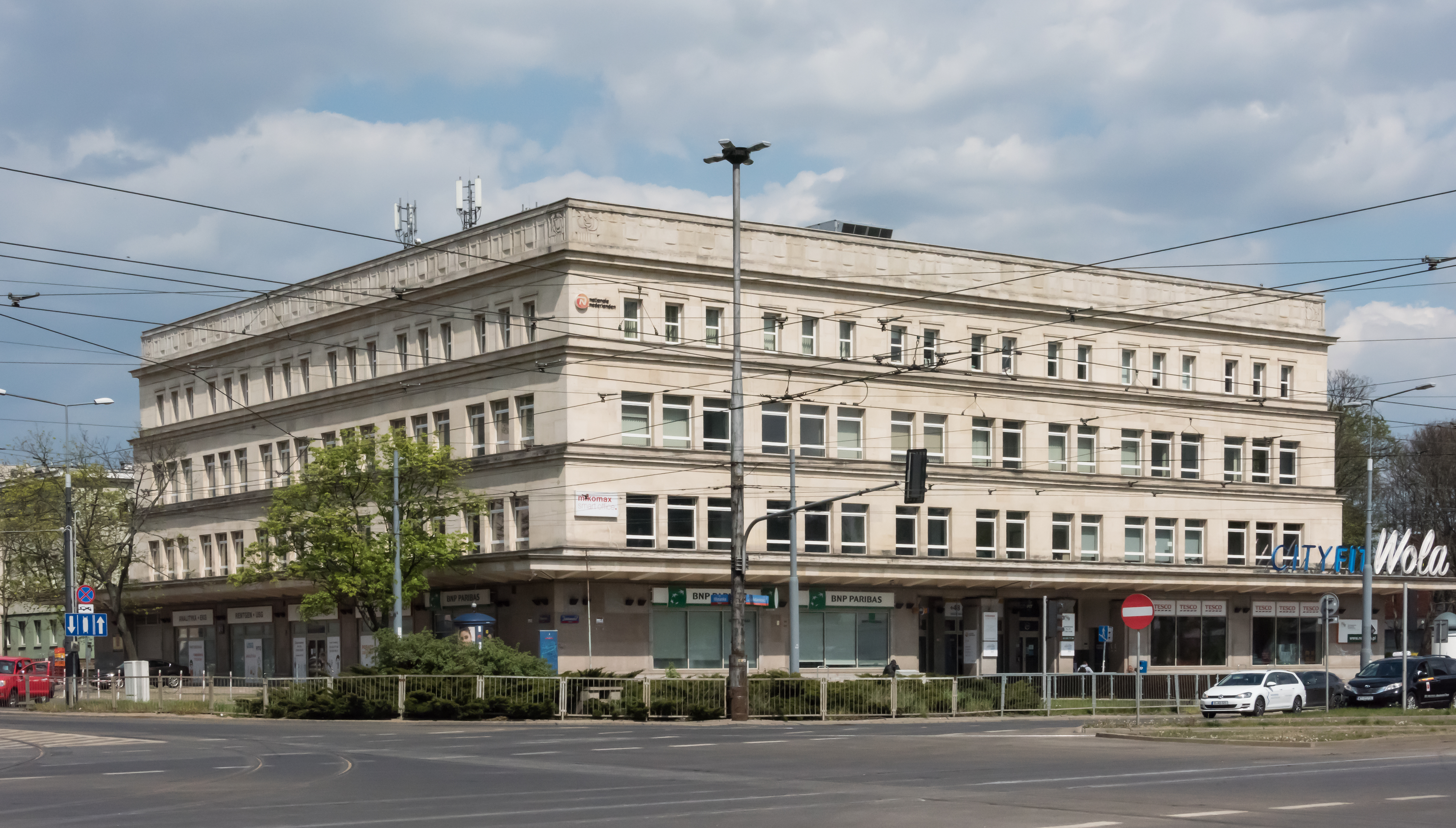 Budynek dawnego PDT Wola w Warszawie